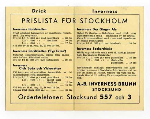 Sortiment för Inverness brunn